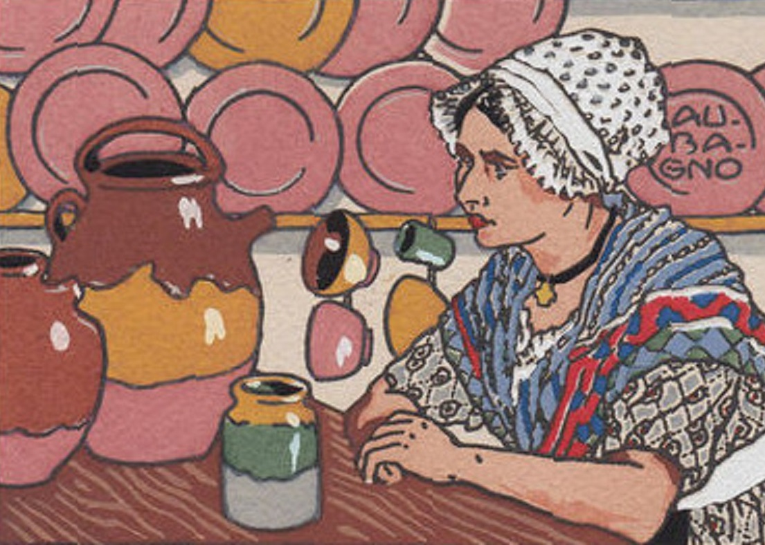 Provençale et ses poteries culinaires à Aubagne